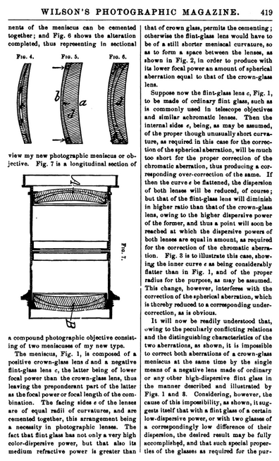 Page 419 de l'article d'Ernst Gundlach sur l'évolution de l'optique en photographie.